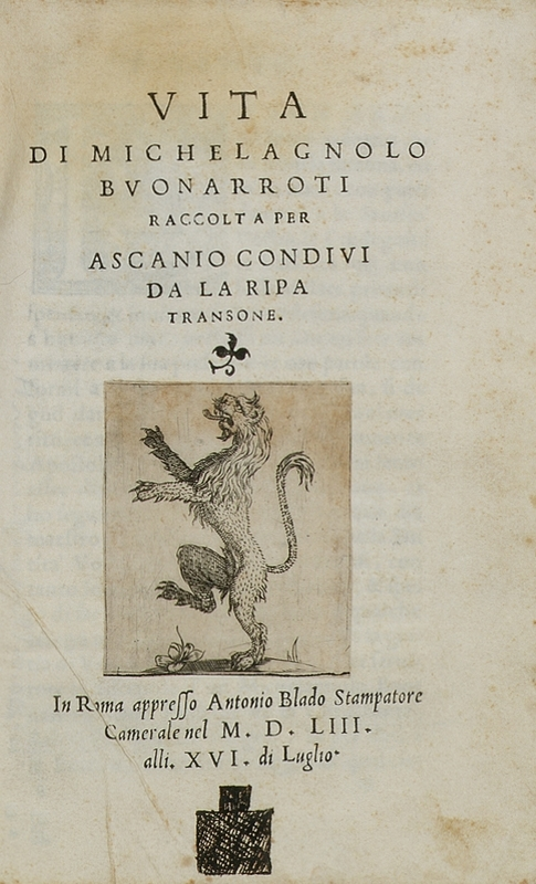 Vita di Michelagnolo Buonarroti raccolta per Ascanio Condivi da la Ripa Transone Title page